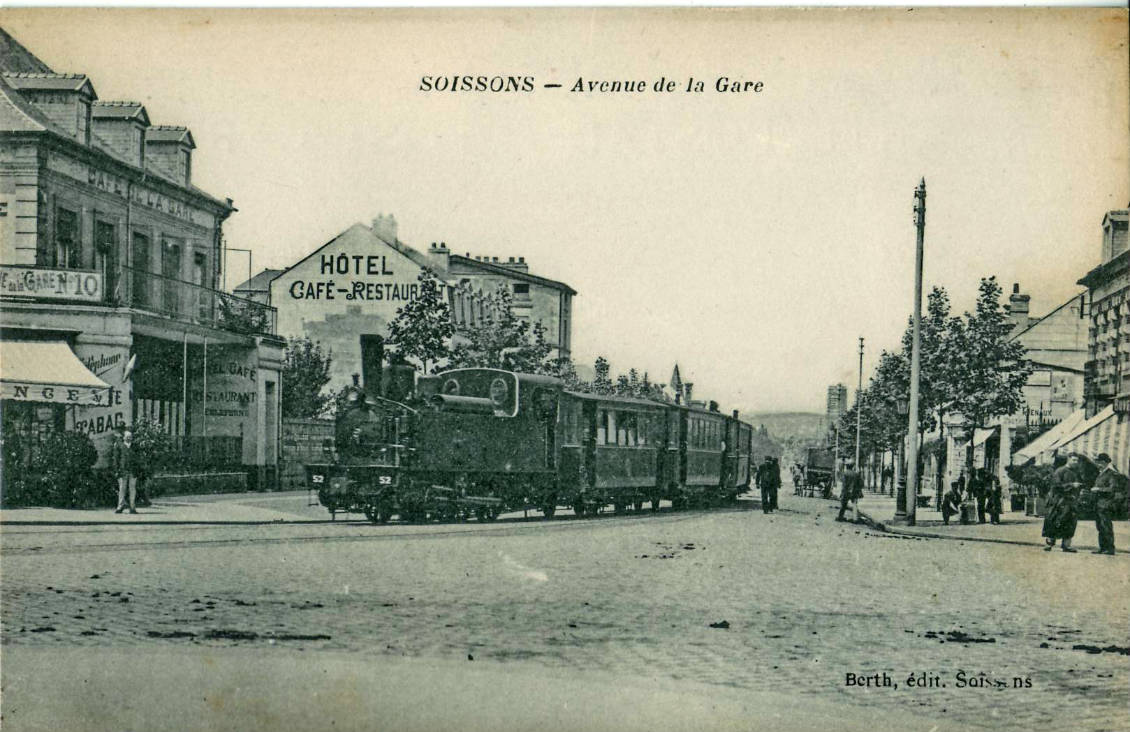 Carte postale ancienne éditée par Berth à Soissons :SOISSONS - Avenue de la Gare